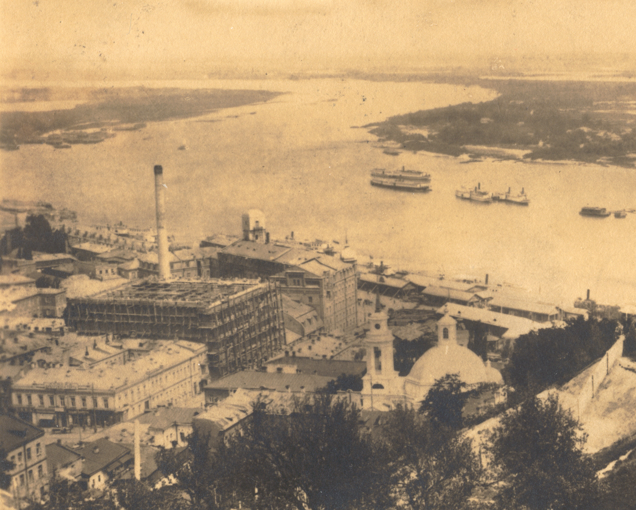 Kiev, «Lazar Brodsky» flour mill